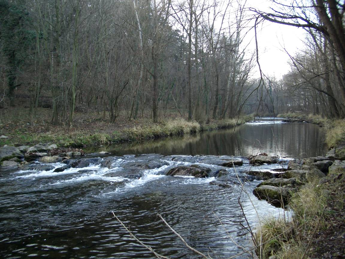 Schwechat auf der Höhe der Burgruinen Kamera: Casio Exilim EX-Z4 Aufnahmedatum: 7. Dezember 2004